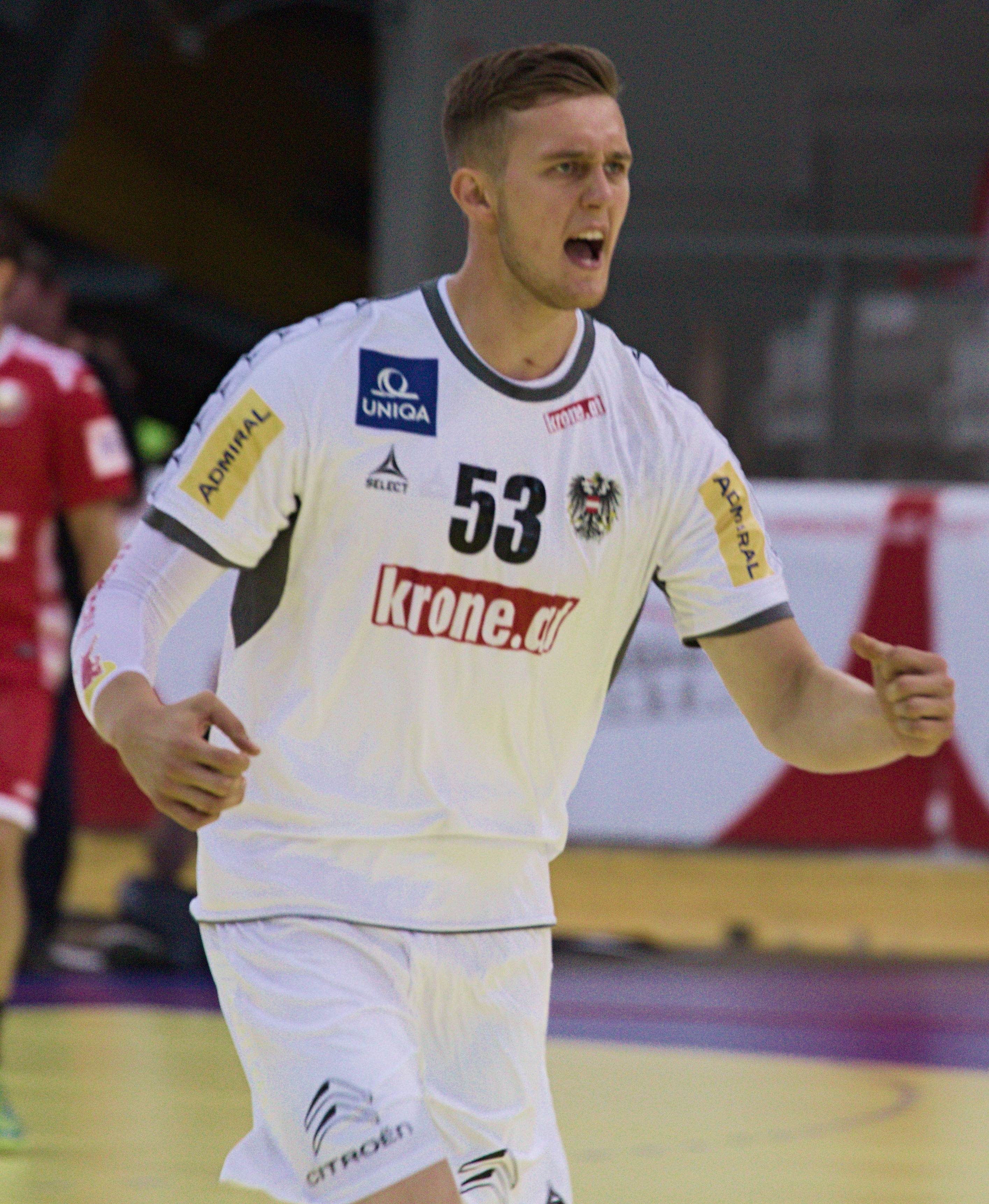 Handball-WM-Qualifikationsspiel zwischen Österreich und Weißrussland in Wien, 13. Juni 2018:Nikola Bilyk